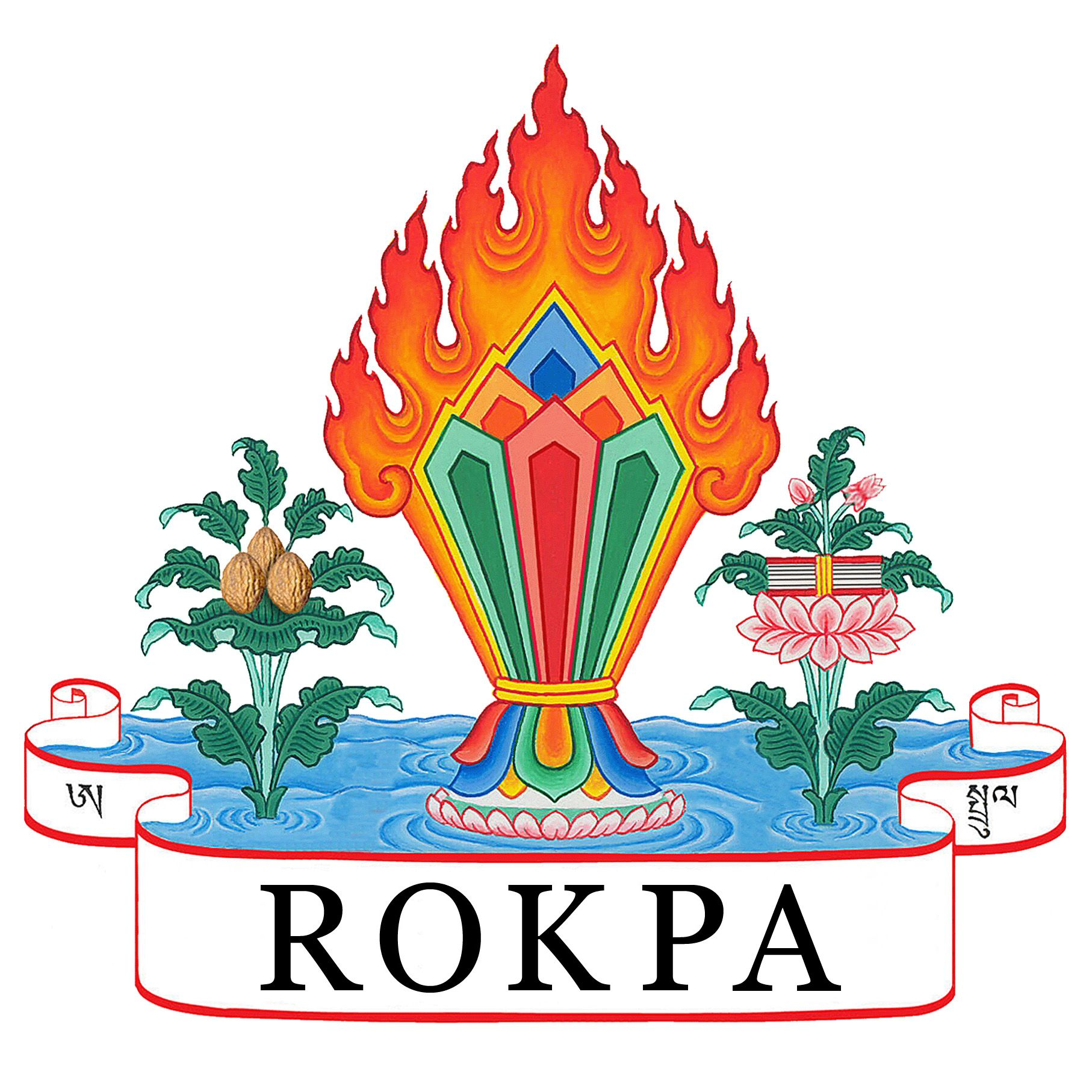 Neues Logo des Hilfswerks ROKPA